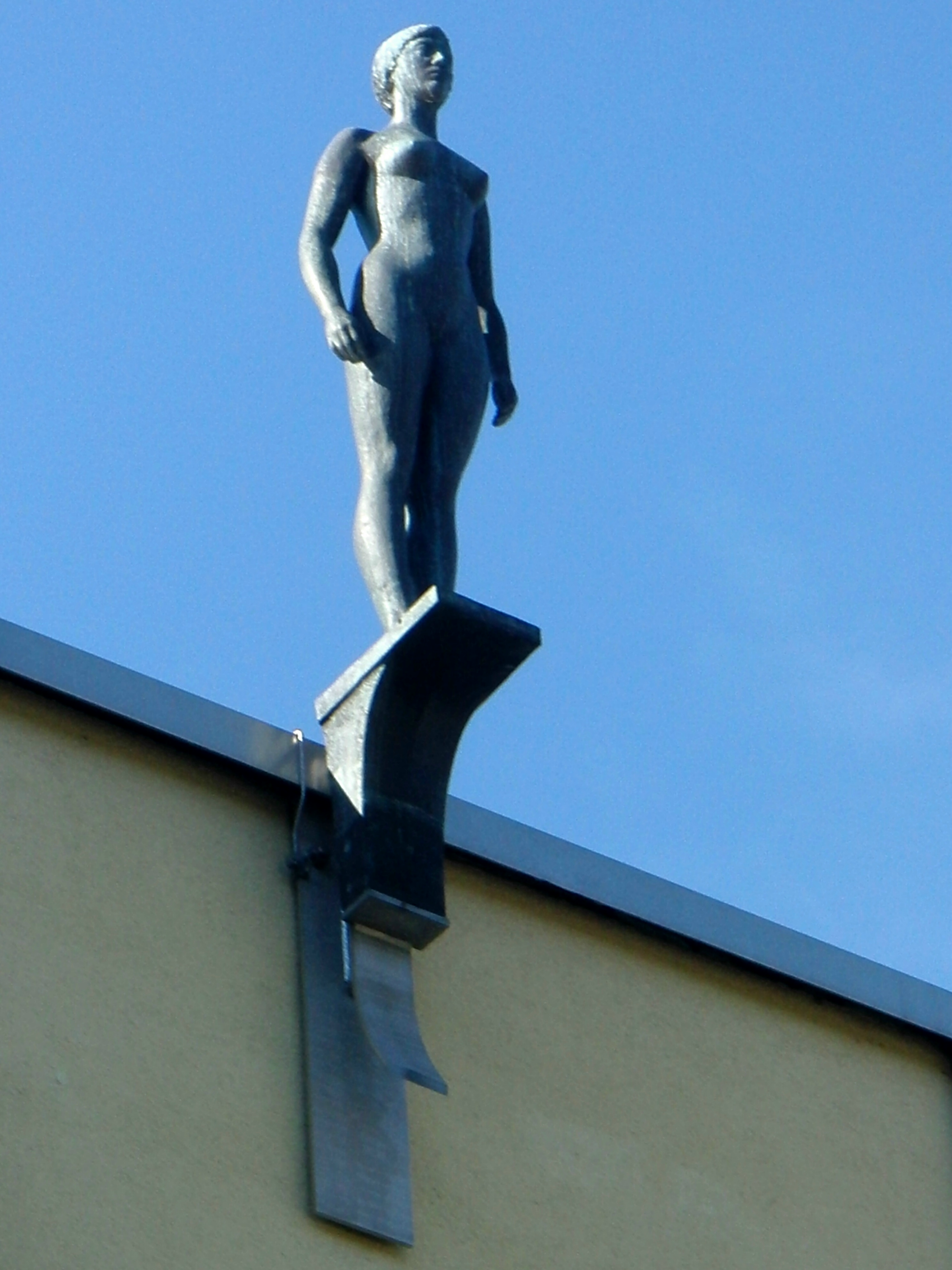 Steger, Hans – Bronzefigur Turmspringerin Dresden Schwimmhalle Freiberger Straße